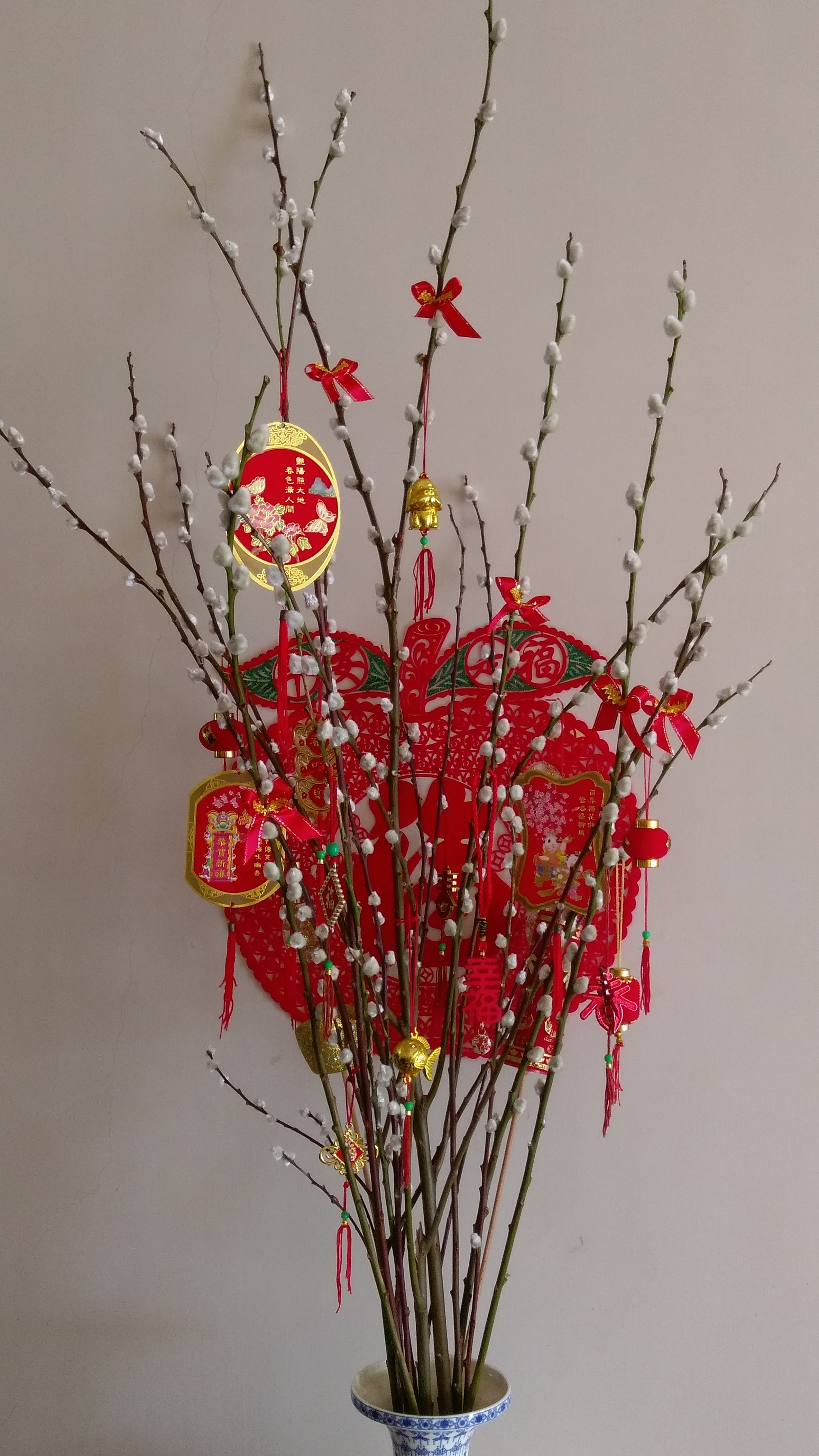 中文（台灣）: 年花銀柳-象徵有銀有樓